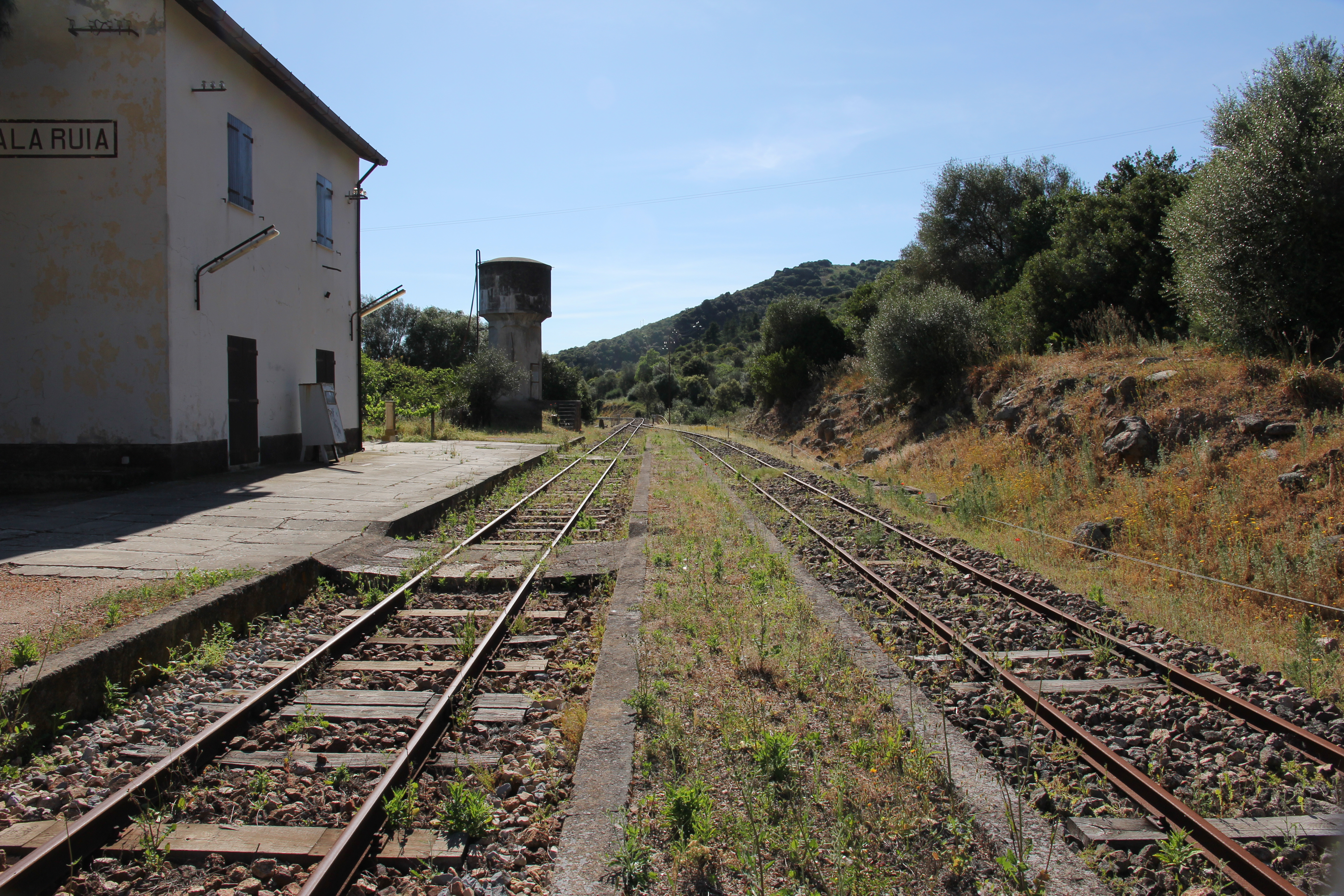 Bortigiadas, stazione ferroviaria di Scala Ruia - Ferrovia Sassari-Tempio-Palau